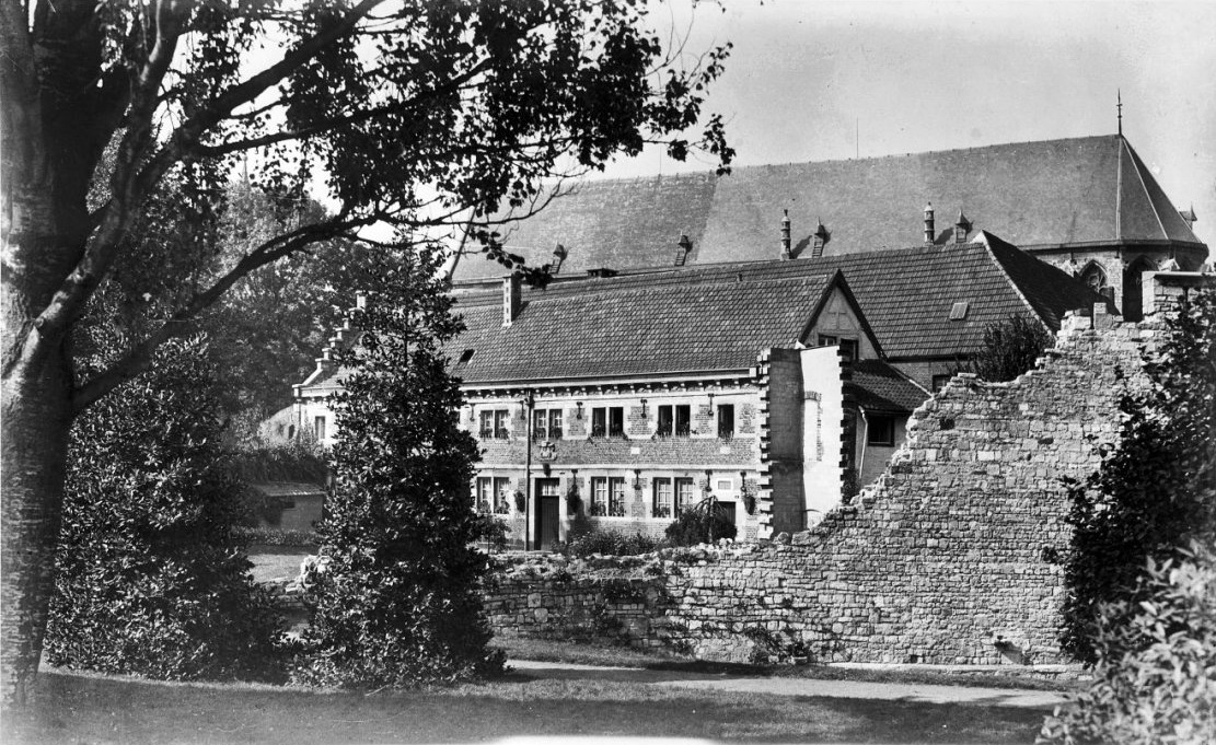 Feilzustersklooster: overzicht